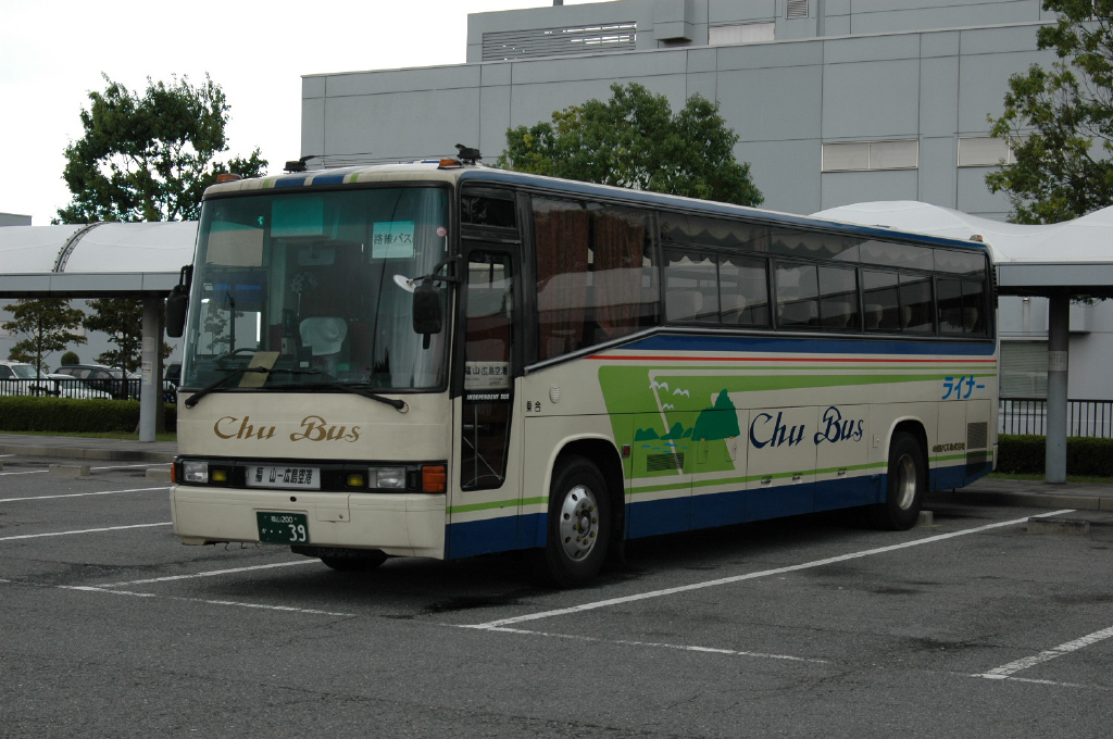 ももっちライナーになる以前 2006-9-20撮影